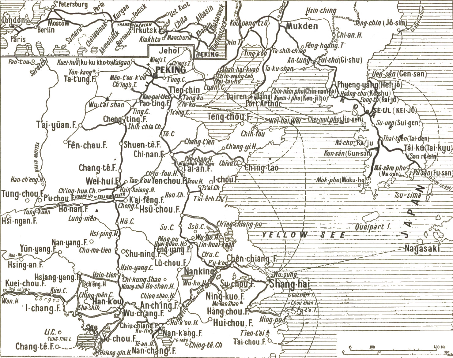 El norte de China en 1912, con las principales líneas férreas.